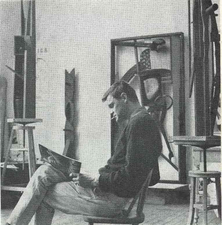 Carl Köhler i sin atelje 1960